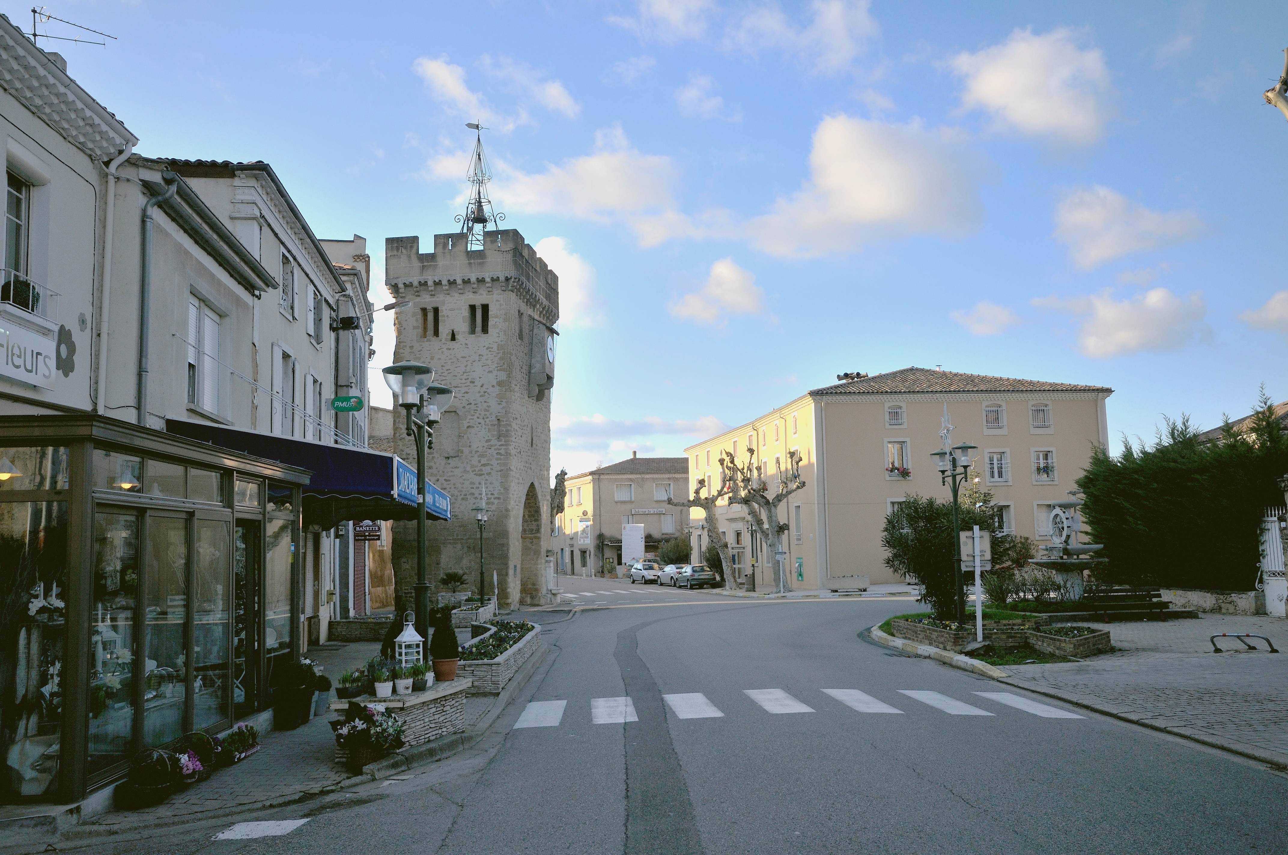 Tour de Beaumont les valence drôme france.